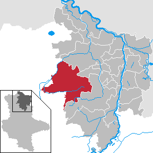 Bismark (Altmark) im Landkreis Stendal, Sachsen-Anhalt